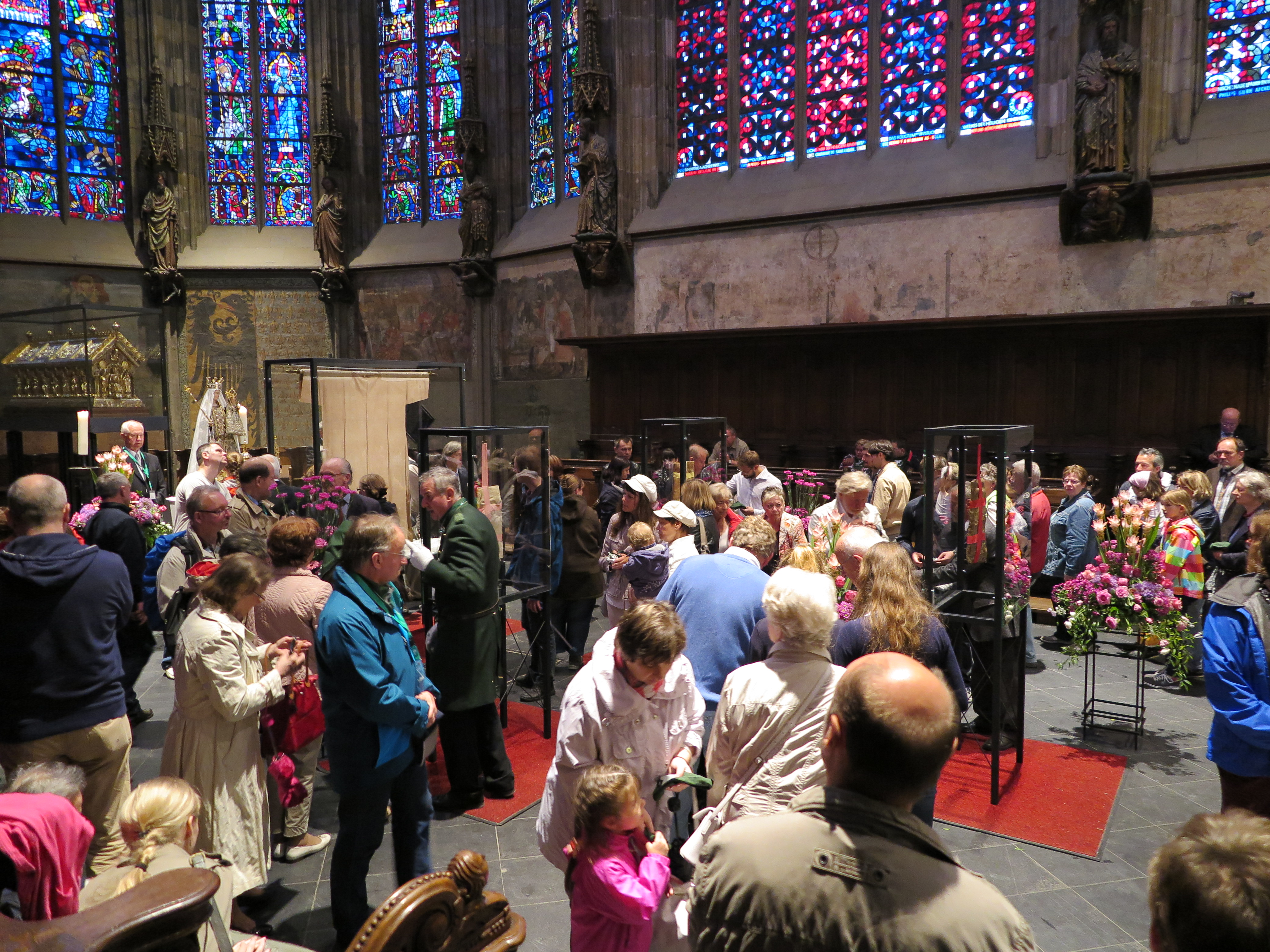 Trubel in der Chorhalle des Aachener Doms bei der Zeigung der Heiligtümer während der Aachener Heiligtumsfahrt 2014.